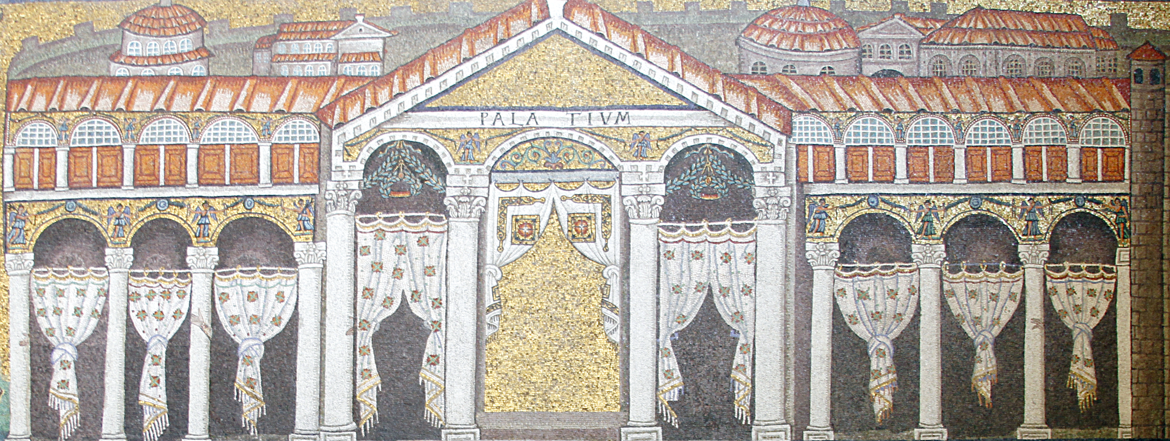 Theodoric's Palace - Sant'Apollinare Nuovo - Ravenna